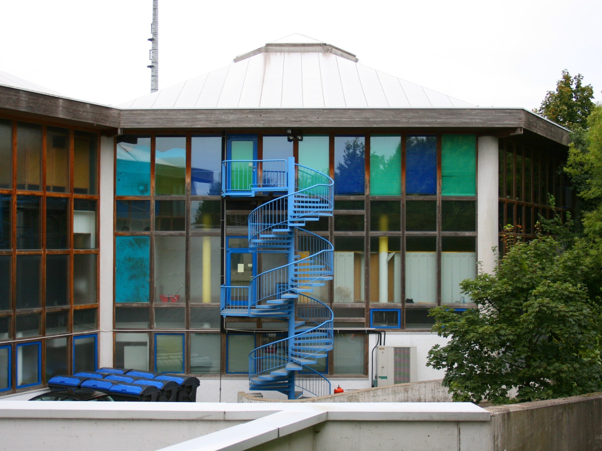 "Bergische Sonne" - Spaßbad mit Sauna und Gastronomie in Wuppertal